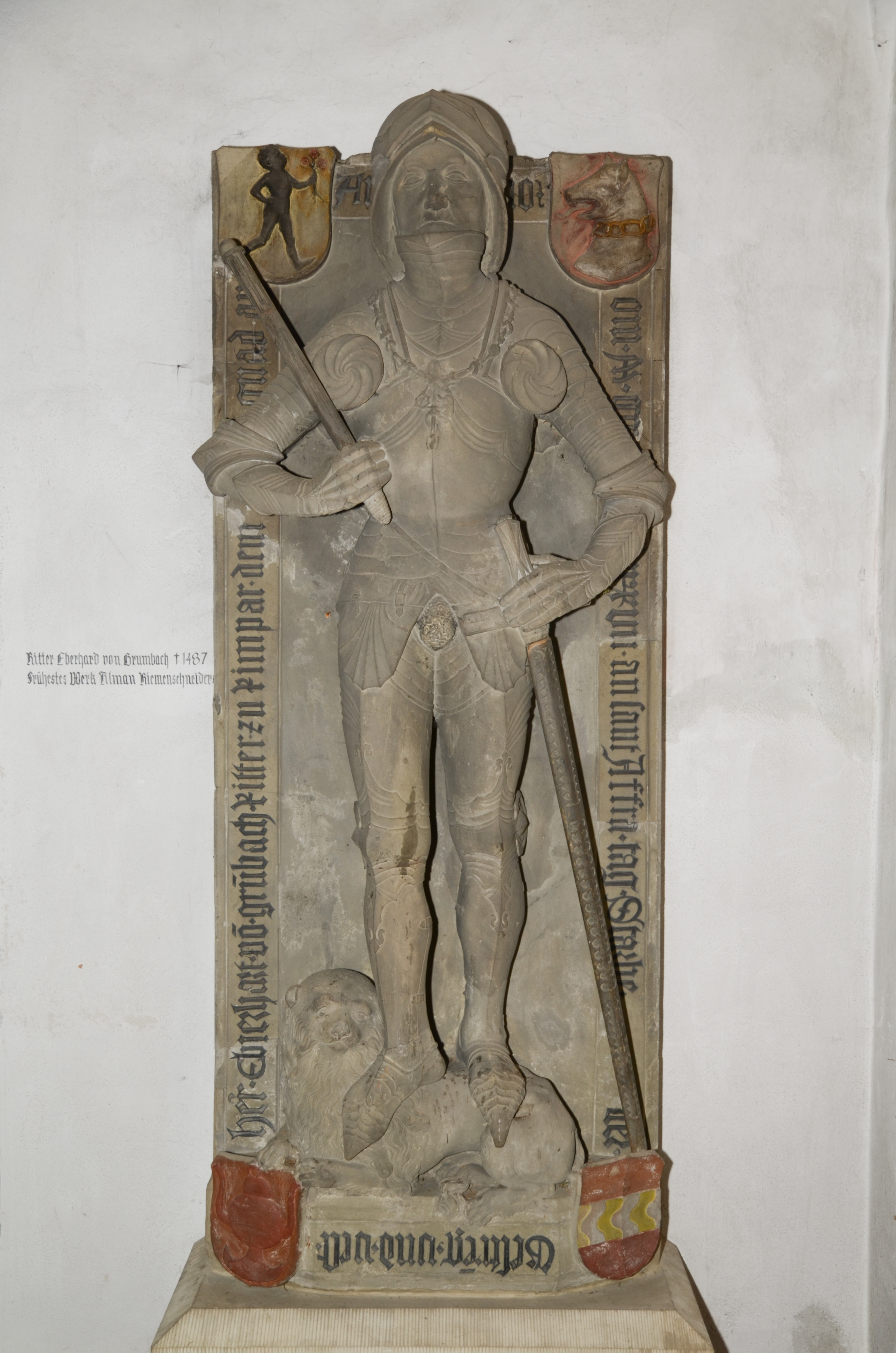 Rimpar St. Peter und Paul Riemenschneiderepitaph für Eberhardt von Grumbach 1487